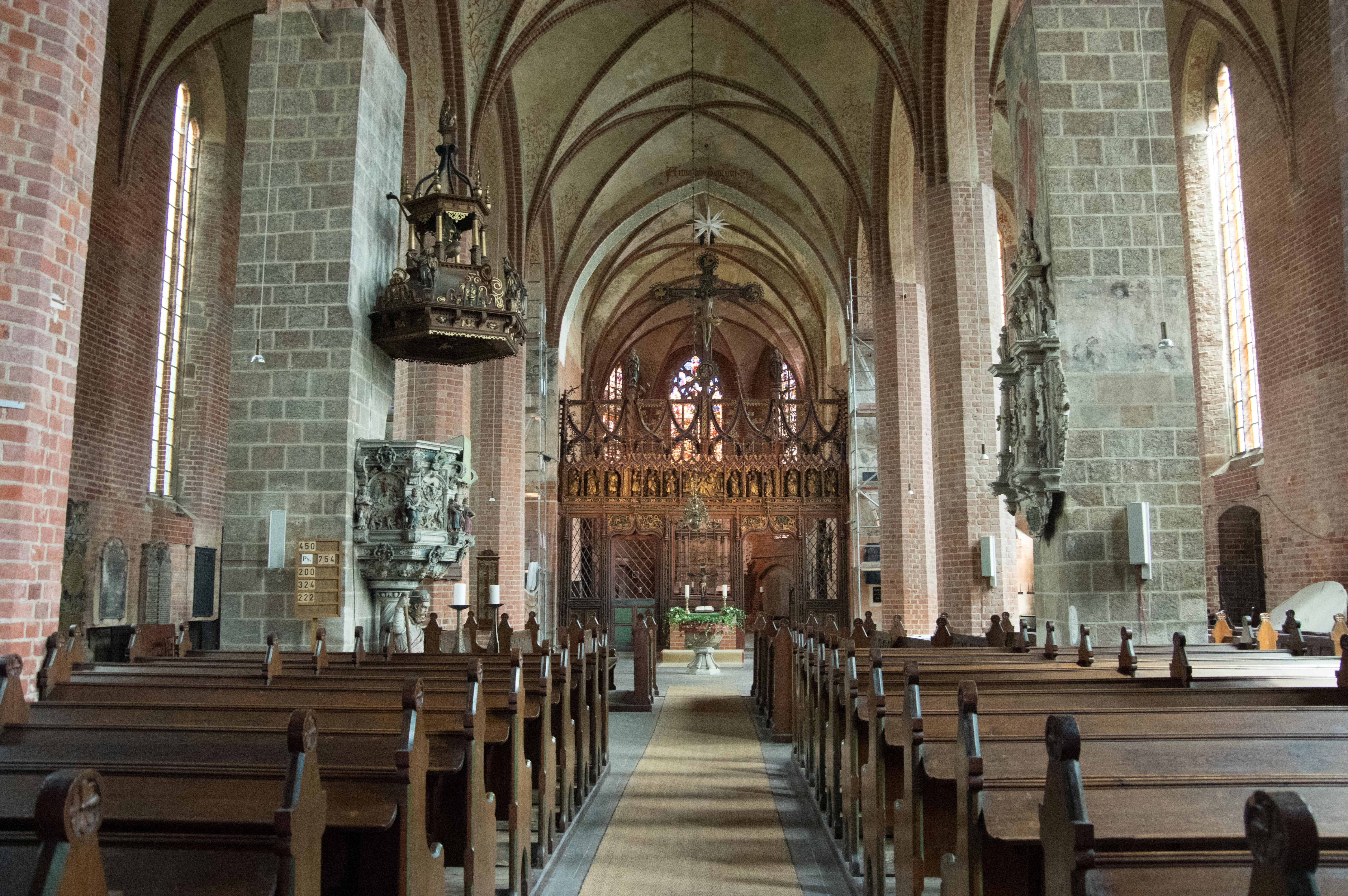 Stendal in Sachsen-Anhalt. Die Jacobikirche steht unter Denkmalschutz.